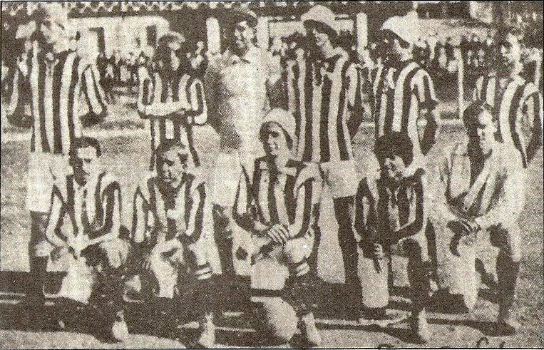 Clube Atlético Mineiro, Belo Horizonte (MG), Brazil, 1915 First winner of the State Championship, then Campeonato da Cidade de Belo Horizonte Primeiro ganhador do Campeonato da Cidade de Belo Horizonte, atual Campeonato Mineiro